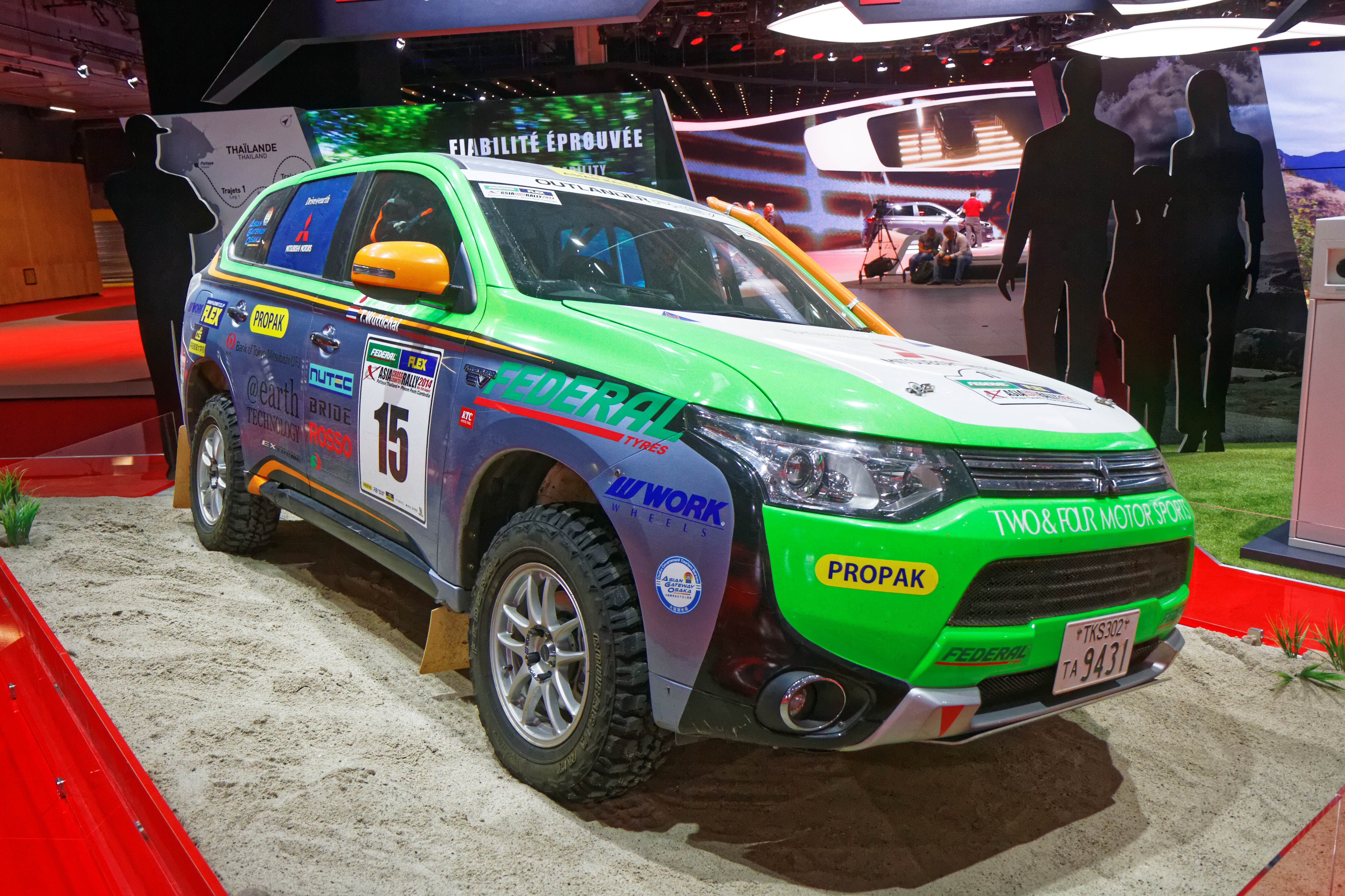 Un Mitsubishi Outlander présenté lors du mondial de l'automobile de Paris 2014.